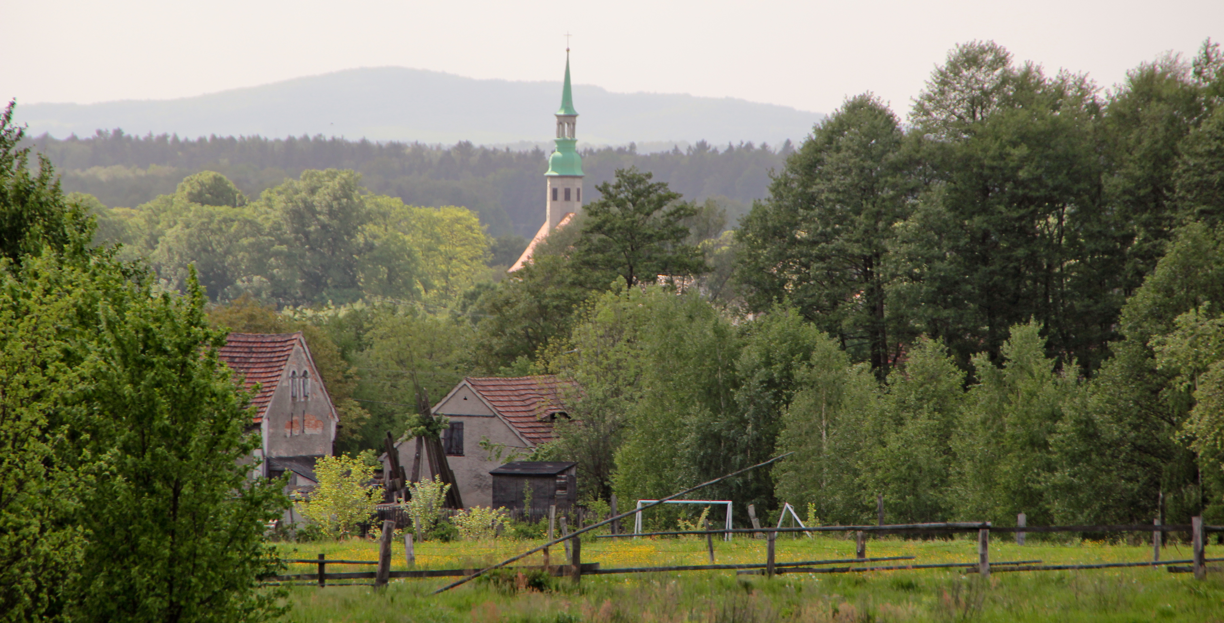 Trójca – kościół parafialny pw. św. Piotra i Pawła (zabytek nr A/2041/1056 z 25.01.1964)